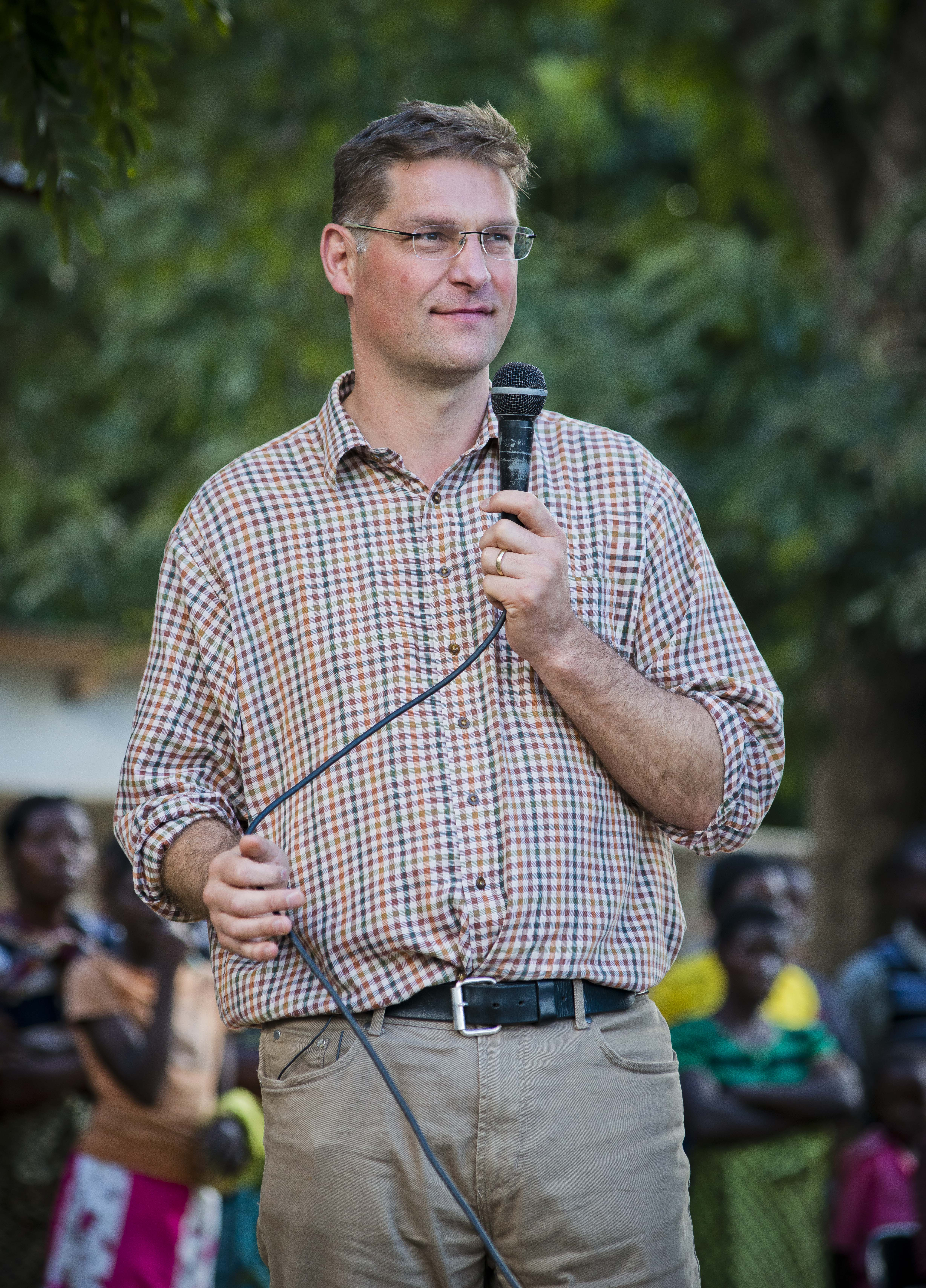 Mary’s Meals-Gründer und Vorsitzender Magnus MacFarlane-Barrow hält 2015 bei der Veranstaltung anlässlich der Ernährung von einer Million Kindern eine Rede.